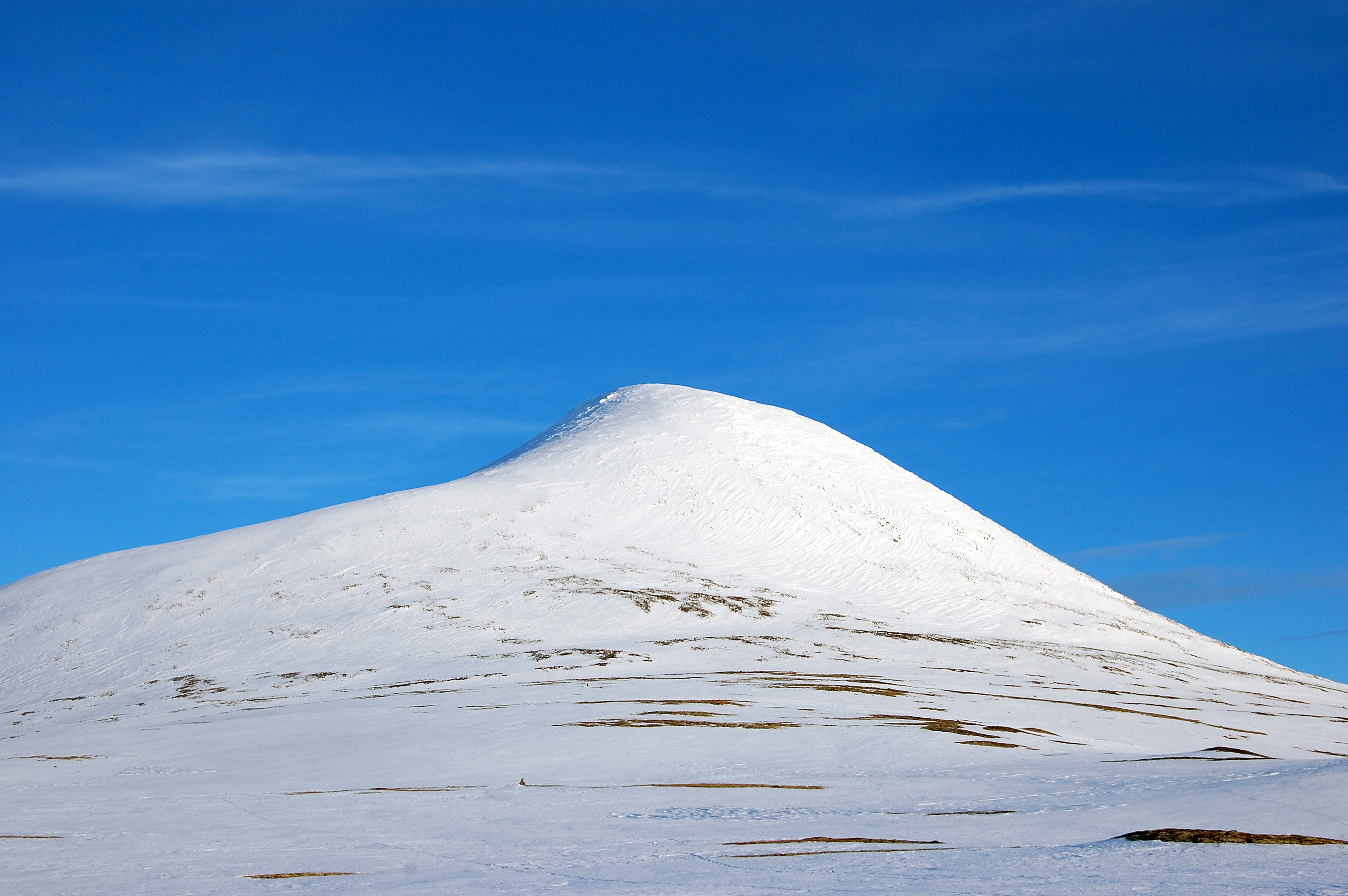 Elgpiggen sett fra NV